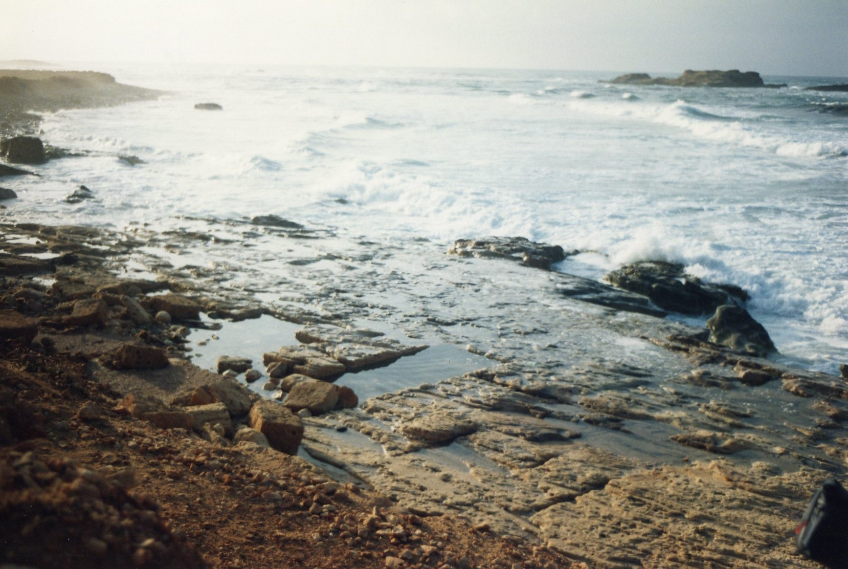 Apollonia. Port oriental, reste de viviers ou de fosses à garum